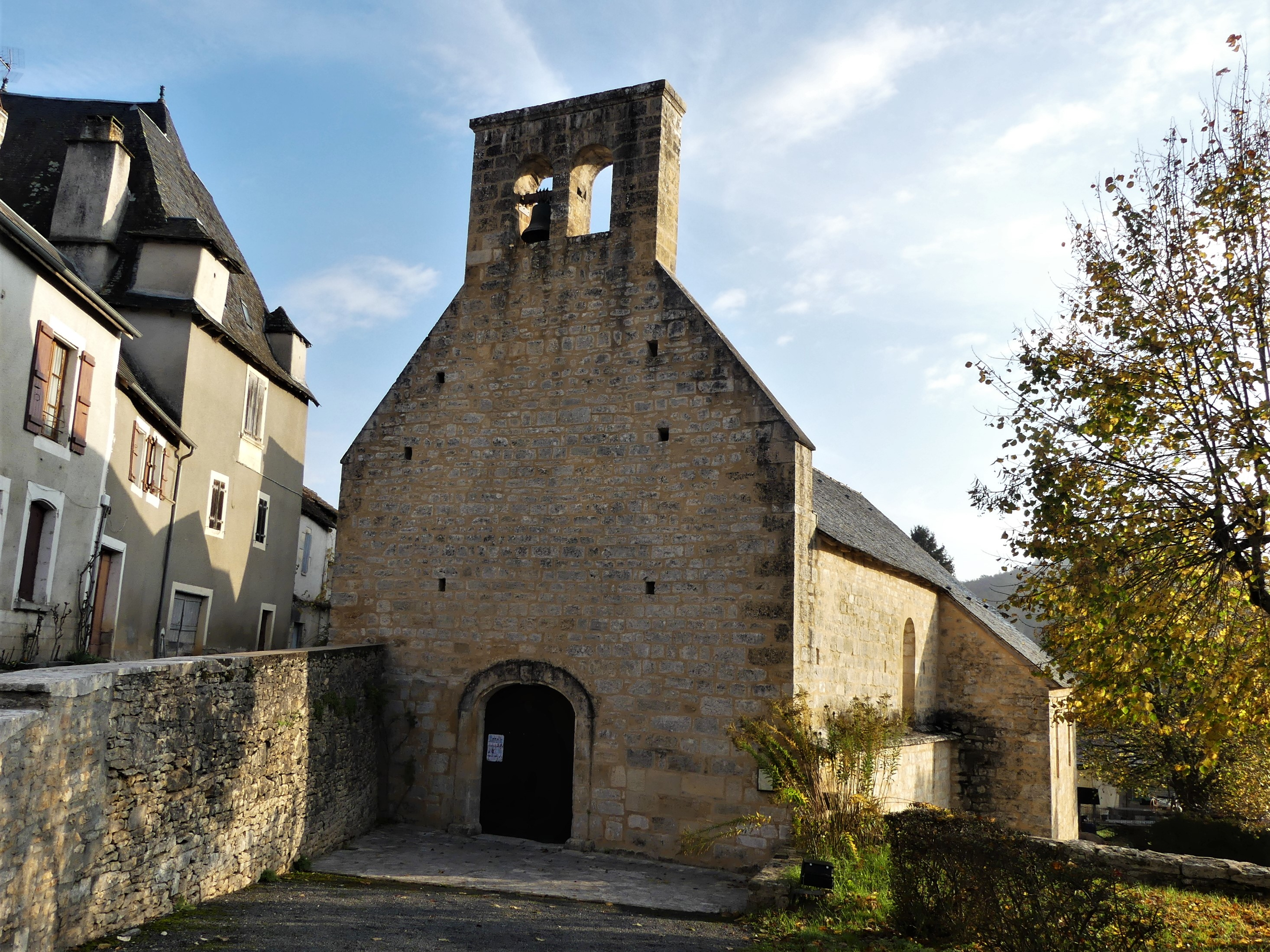 L'église de Coly, Dordogne, France.